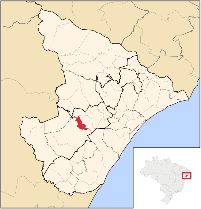 Mapa do Município de São Domingos-SE